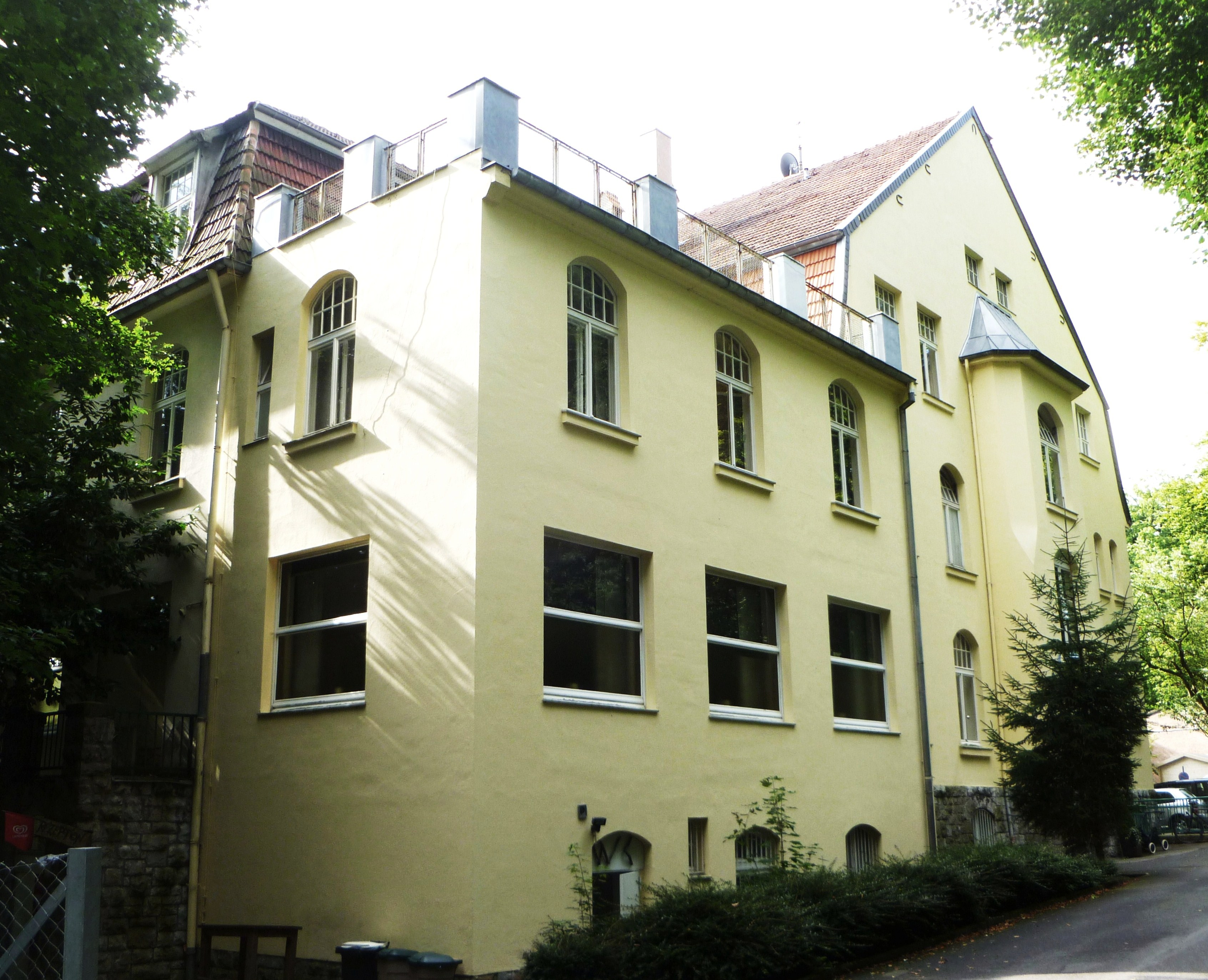 Baudenkmal in Aachen-Mitte, Kinderheim "Maria im Tann", Preußwald